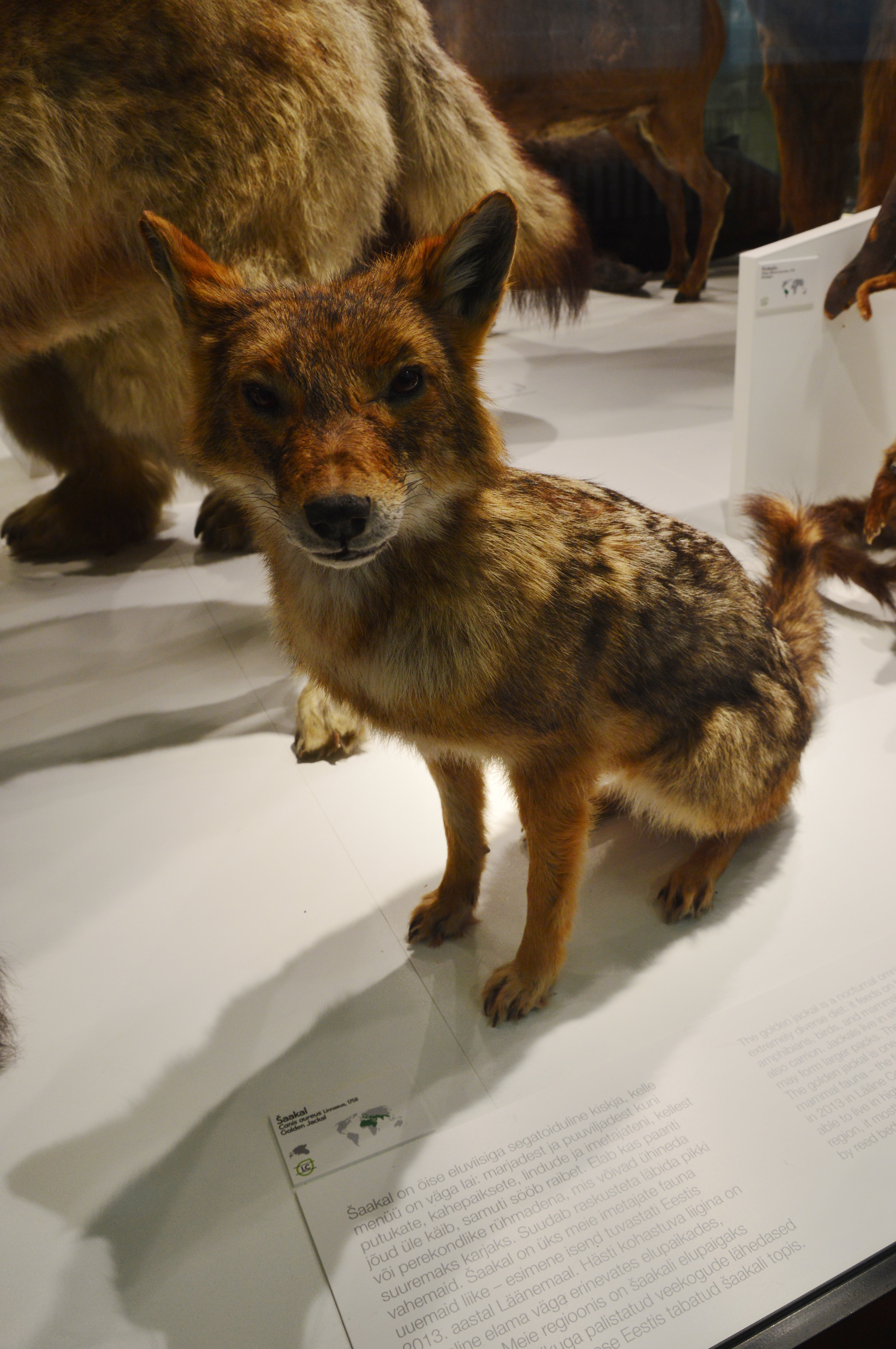 Eesti esimene šaakal. Topis Tartu Ülikooli loodusmuuseumis.